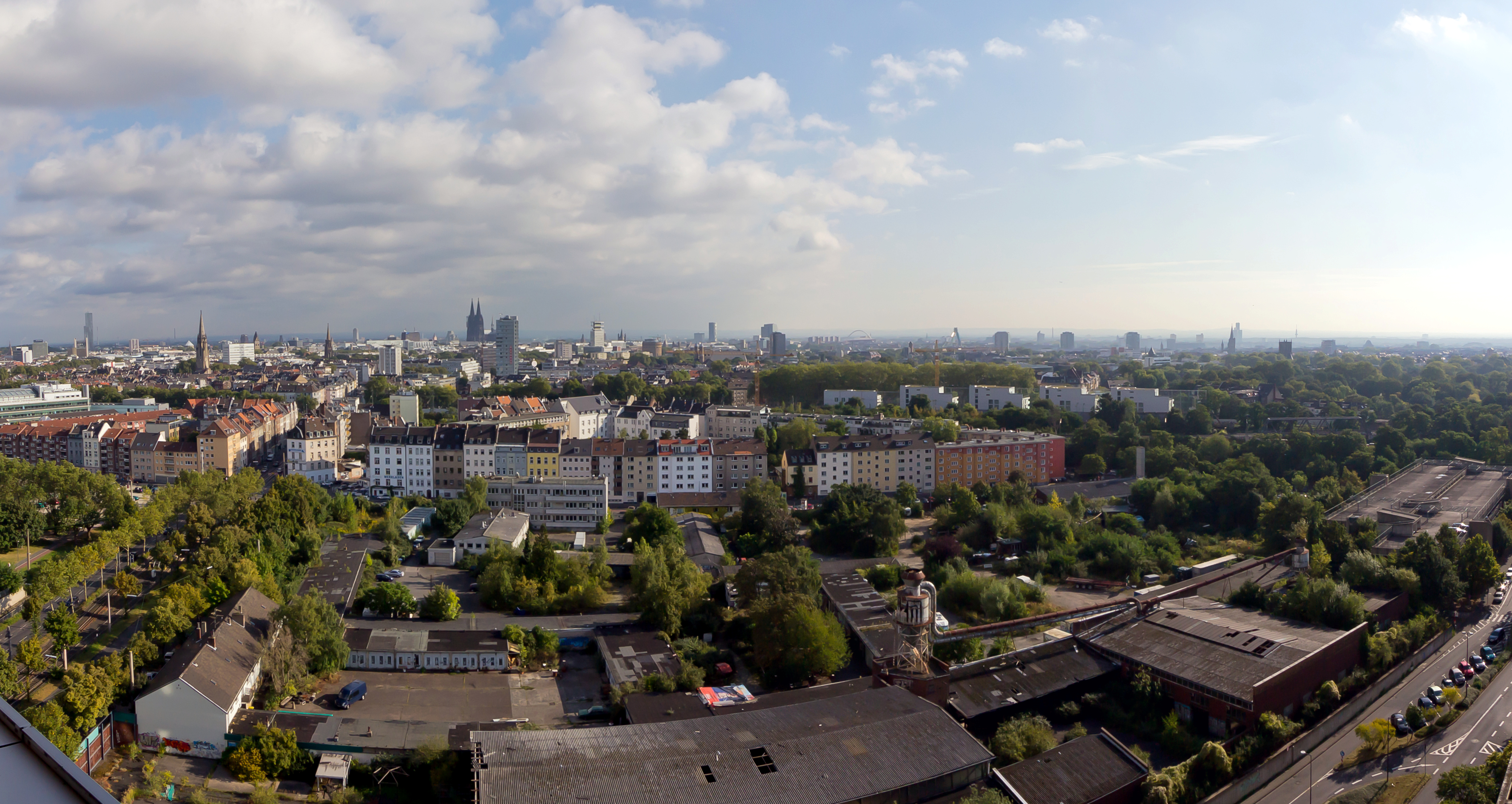 Weitwinkel-/Panorama-Aufnahme aus der 14. Etage des Landgericht-Hochhauses auf die Gewerbebrache Eifelwall/Luxemburger Straße in Köln-Neustadt-Süd. Im oberen Bereich ist der Neubau des Historischen Archives der Stadt Köln geplant, der Rest der Fläche (mit Ausnahme des Justiz-Parkhauses) soll eine Erweiterung des Inneren Grüngürtels werden.